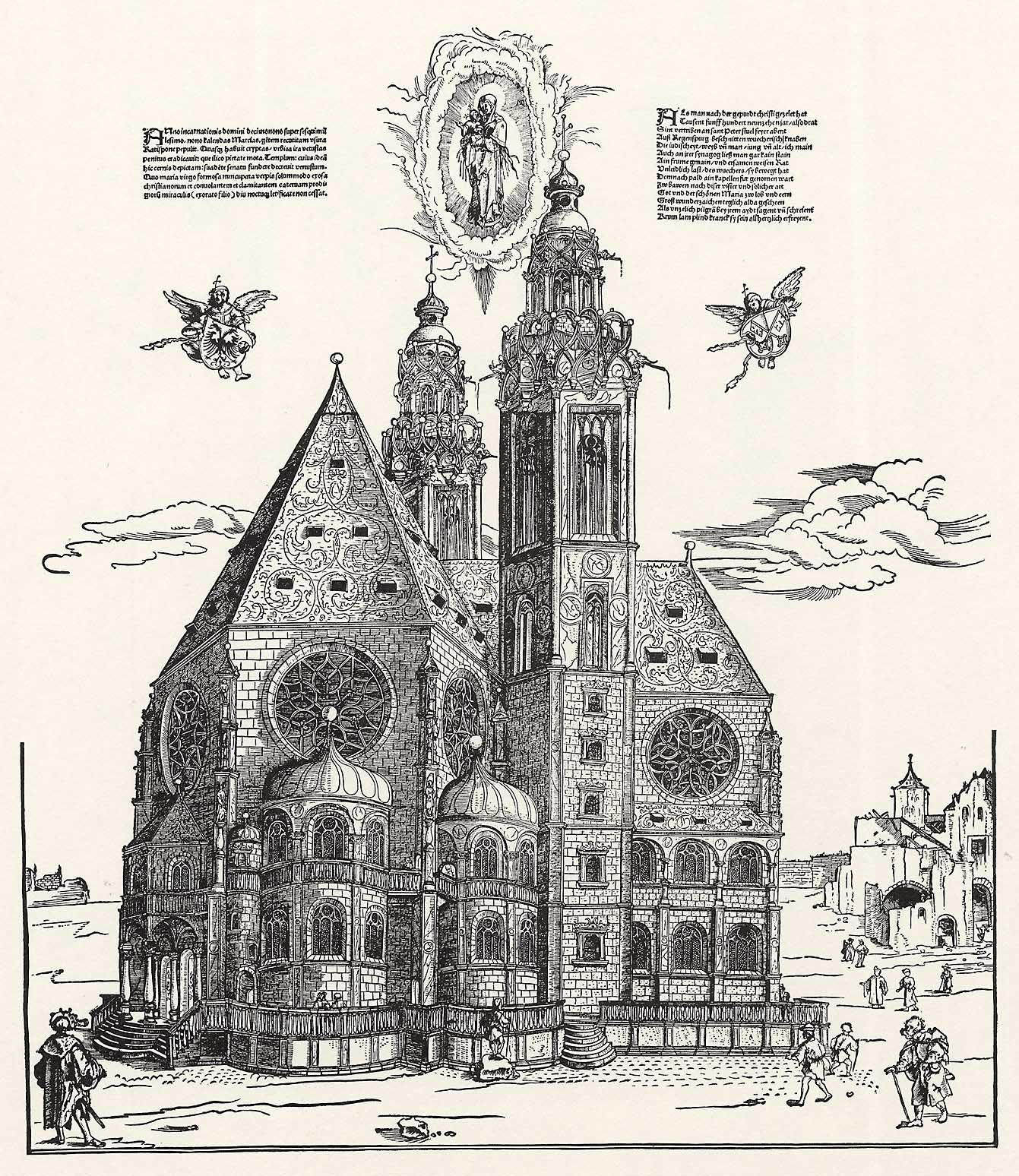 Michael Ostendorfer (1490-1559): Neue Kirche der Schönen Maria in Regensburg, Neupfarrkirche